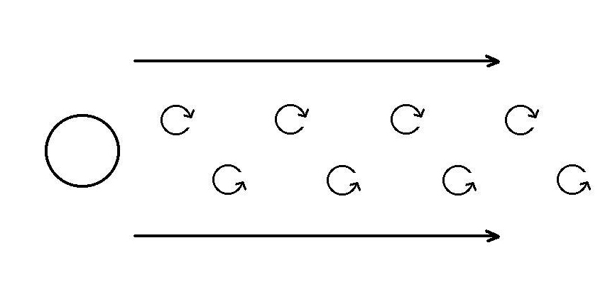 von Karman vortex street